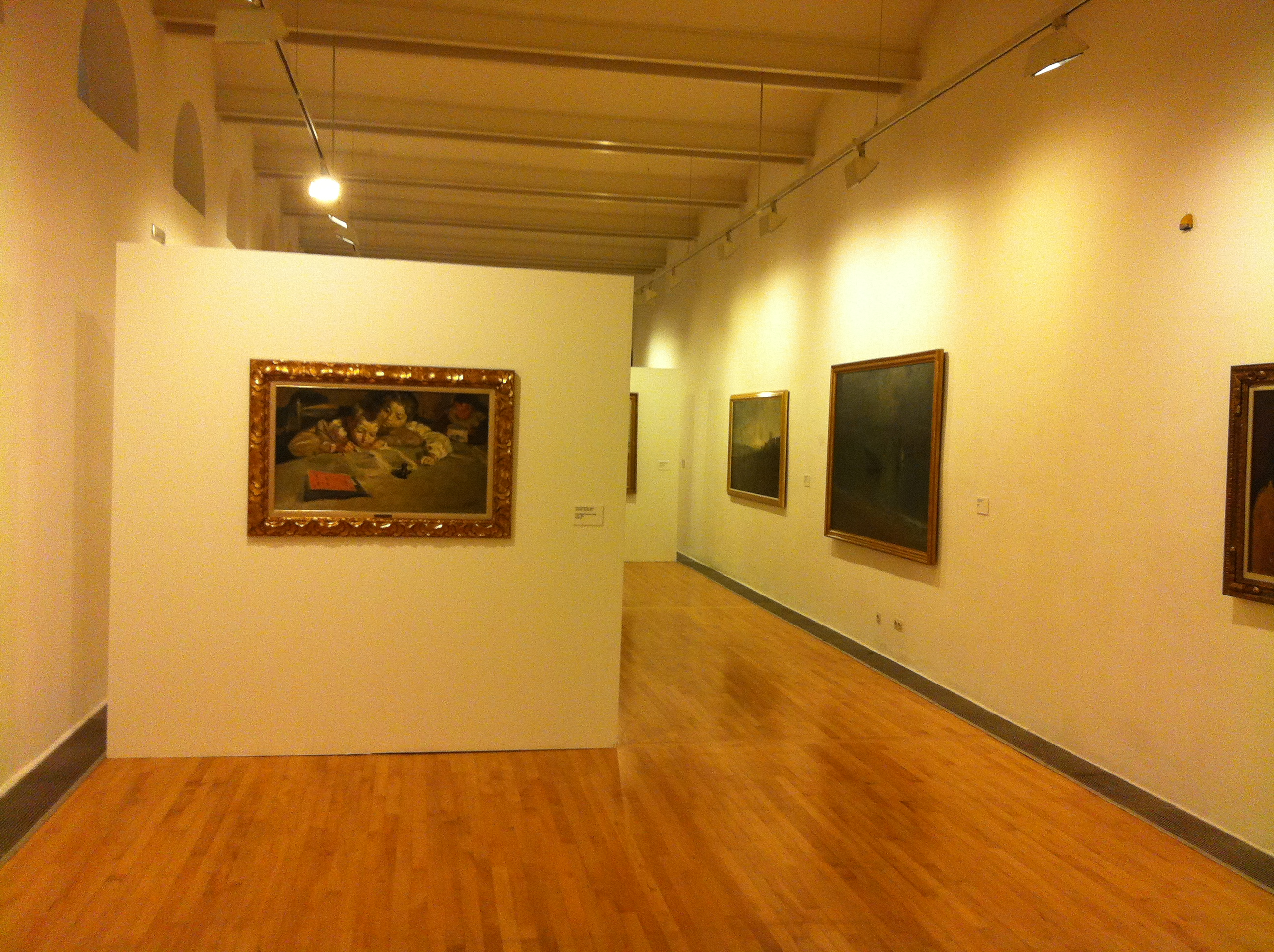 Obra exposada a l'Exposició Del Realisme al Noucentisme Collecció Banc Sabadell, al Museu d'Art de Sabadell. L'exposició va ser itinerant i també es va fer a diversos museus de Catalunya, amb petites variacions en la col·lecció. L'obra forma part del fons d'art del Fons d'Art del Banc Sabadell